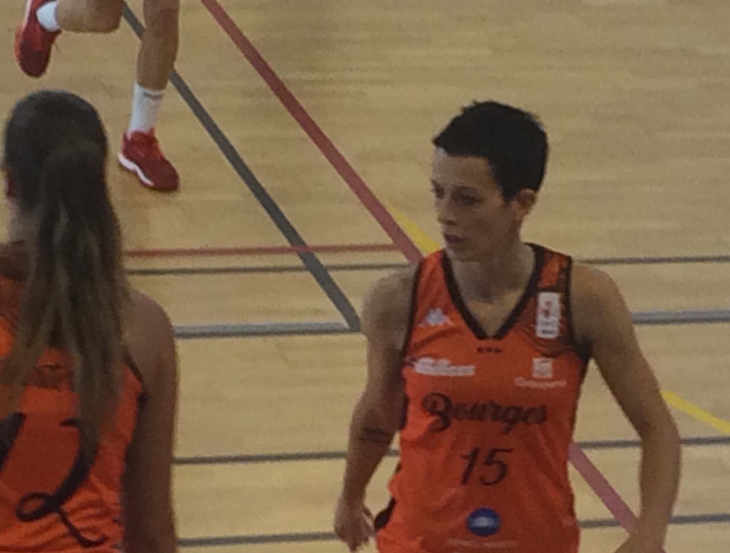 La joueuse serbe des Tango Bourges le 3 septembre 2016 lors d'une rencontre amicale face à Angers aux Pavillons-sous-Bois